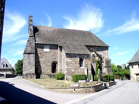 Eglise - extérieur